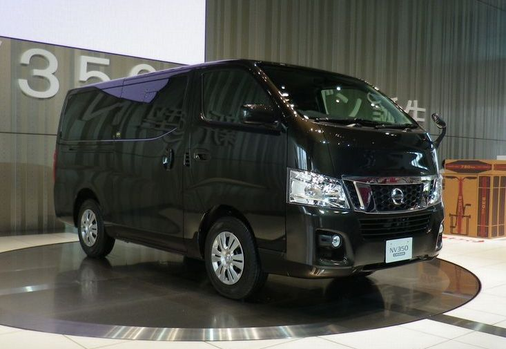 日産・キャラバン